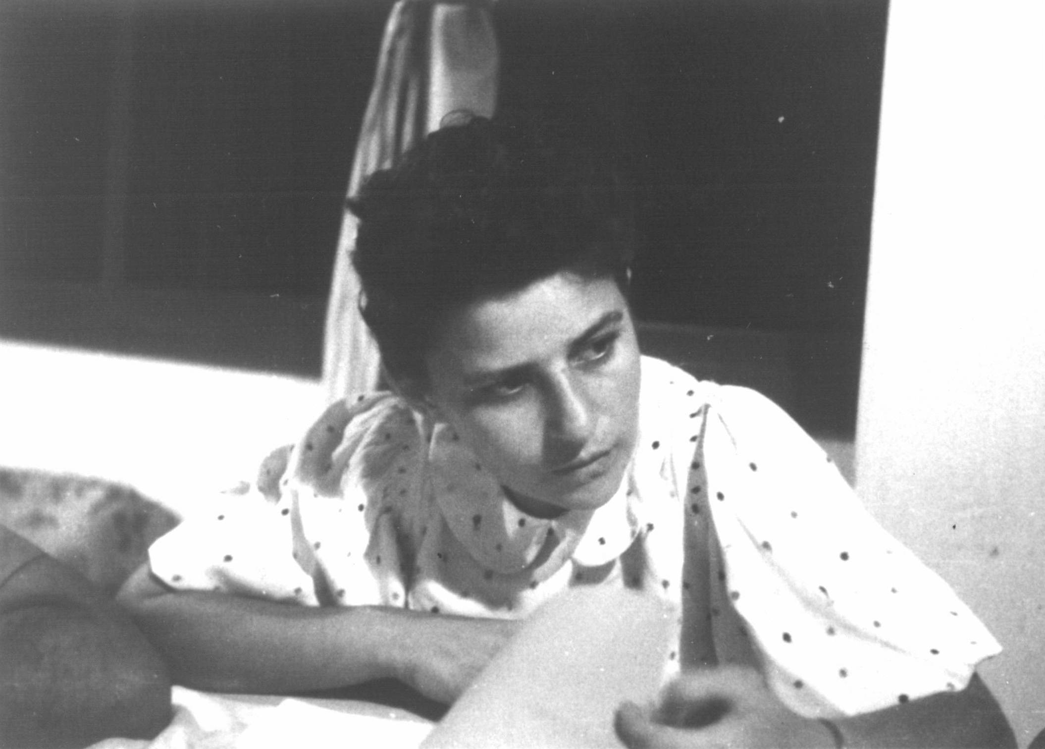 שושנה ספקטור הייתה קצינת השלישות ומזכירת המטה של הפלמ"ח. בתקופת לימודי בבן שמן